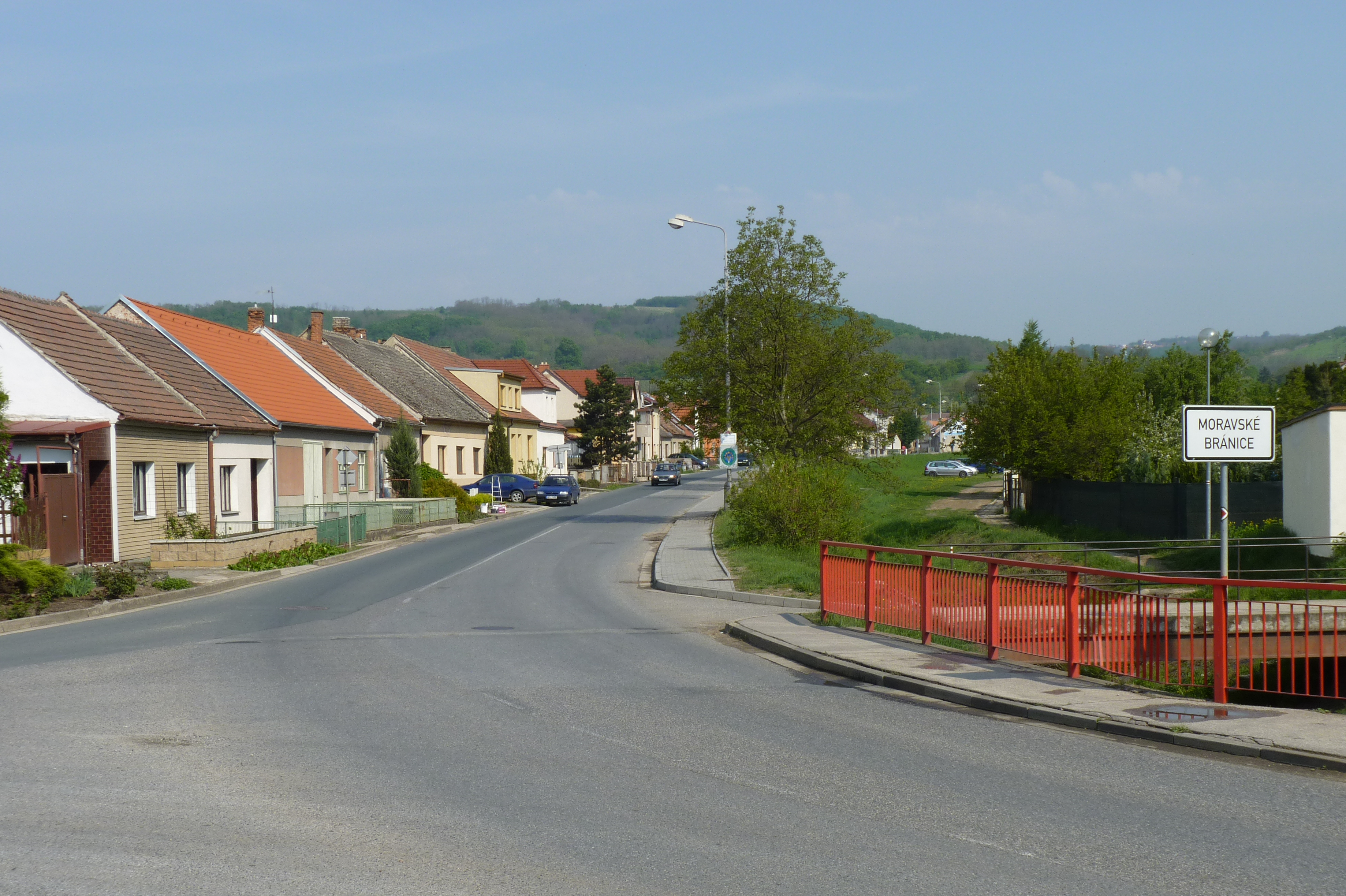 Template:Moravské Bránice, příjezdová cesta. Okres Brno-venkov, Jihomoravský kraj